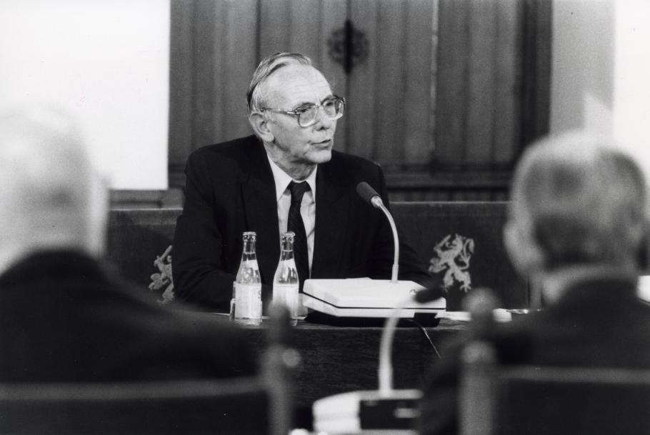 Max van der Stoel (P.v.d.A), minister van Buitenlandse Zaken in het kabinet den Uyl, aan het woord voor de Parlementaire enquêtecommissie inzake de RSV. Nederland, 16 oktober 1984.